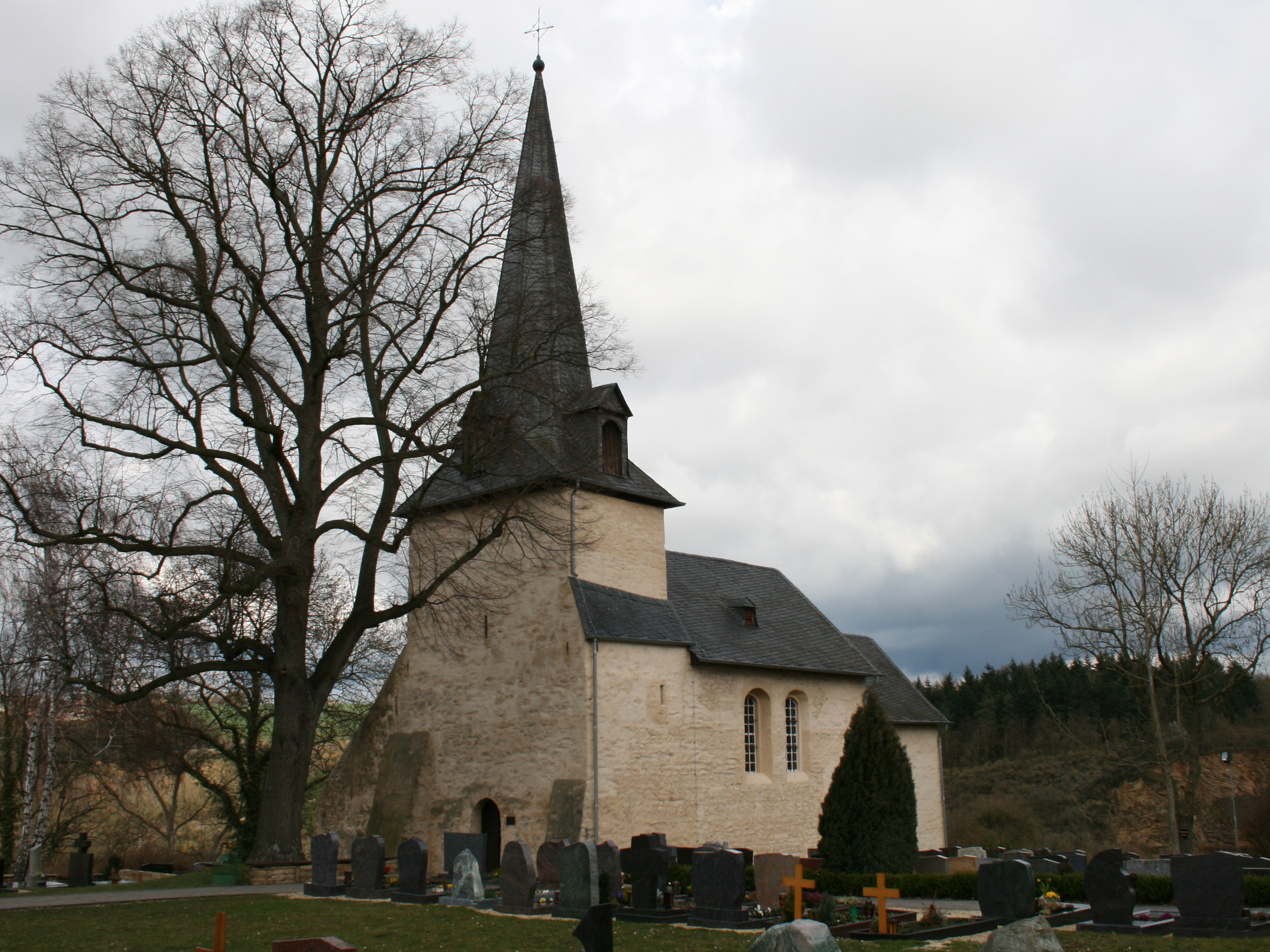 Seitenansicht Südseite der Berger Kirche, Werschau, Deutschland